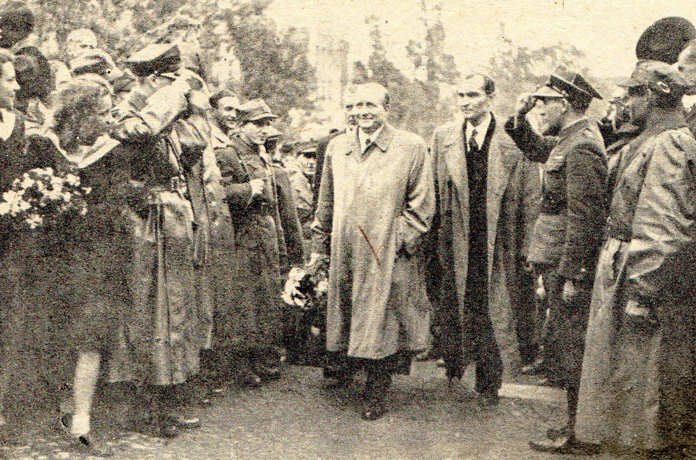 Stanisław Mikołajczyk w Poznaniu w 1945r.